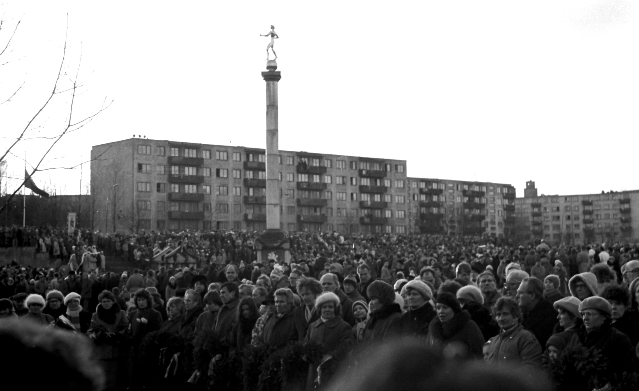 1989 m. Vasario 16-oji Šiauliuose, Saulės laikrodžio aikštėje